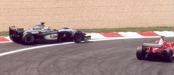 Michael Schumacher saat menyalip Kimi Raikkonen yang sempat melintir akibat ceceran oli dari mobil Toyota milik Allan Mcnish